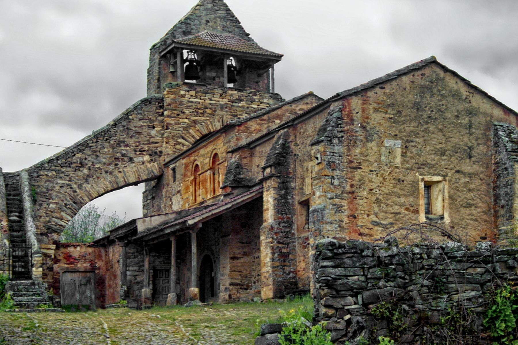 Iglesia, Santa Colomba de Somoza, Castile-Leon